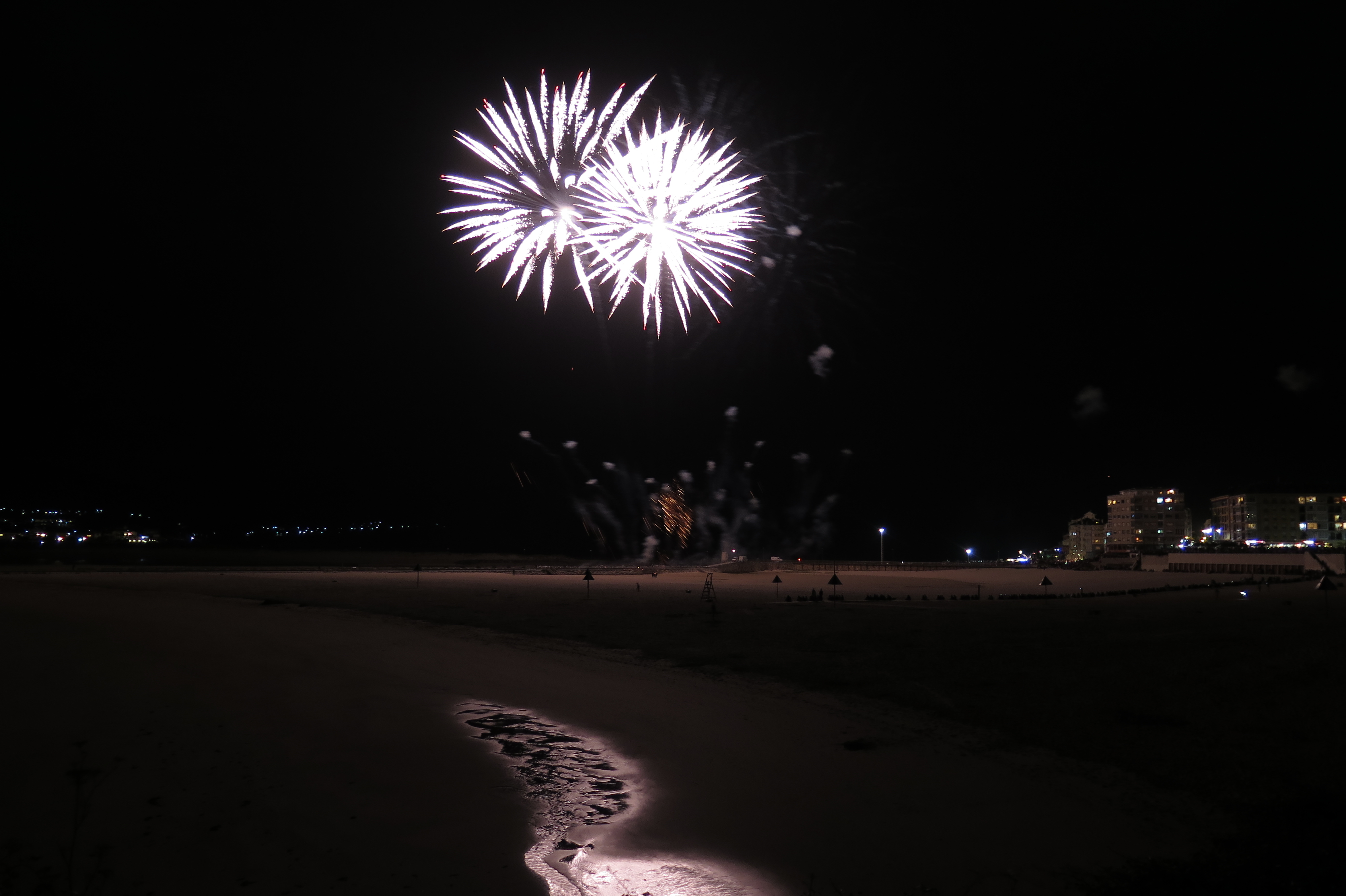 Fin de fiestas de San Lorenzo 2017 en Foz (Lugo). This is a photography of a Folklore festival in Spain (Wikidata id Q23661532).